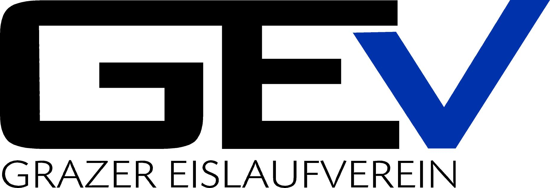 Logo des Grazer Eislaufvereins